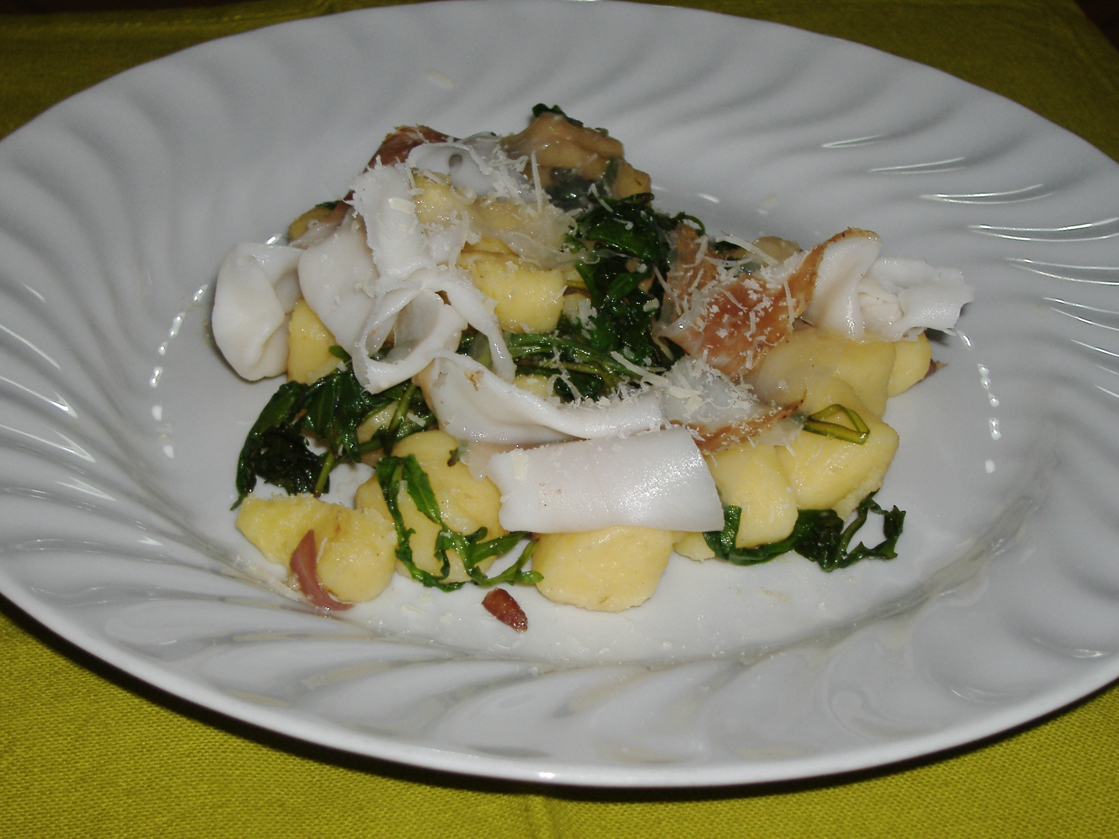 Ingredienti - 180gr. di gnocchi di patate - 2 pugni di rucola - cipolla - olio extravergine di oliva - 6 fettine di Lard d?Arnad tagliate fini - Parmigiano Reggiano - sale e pepe Per la preparazione leggi questo articolo